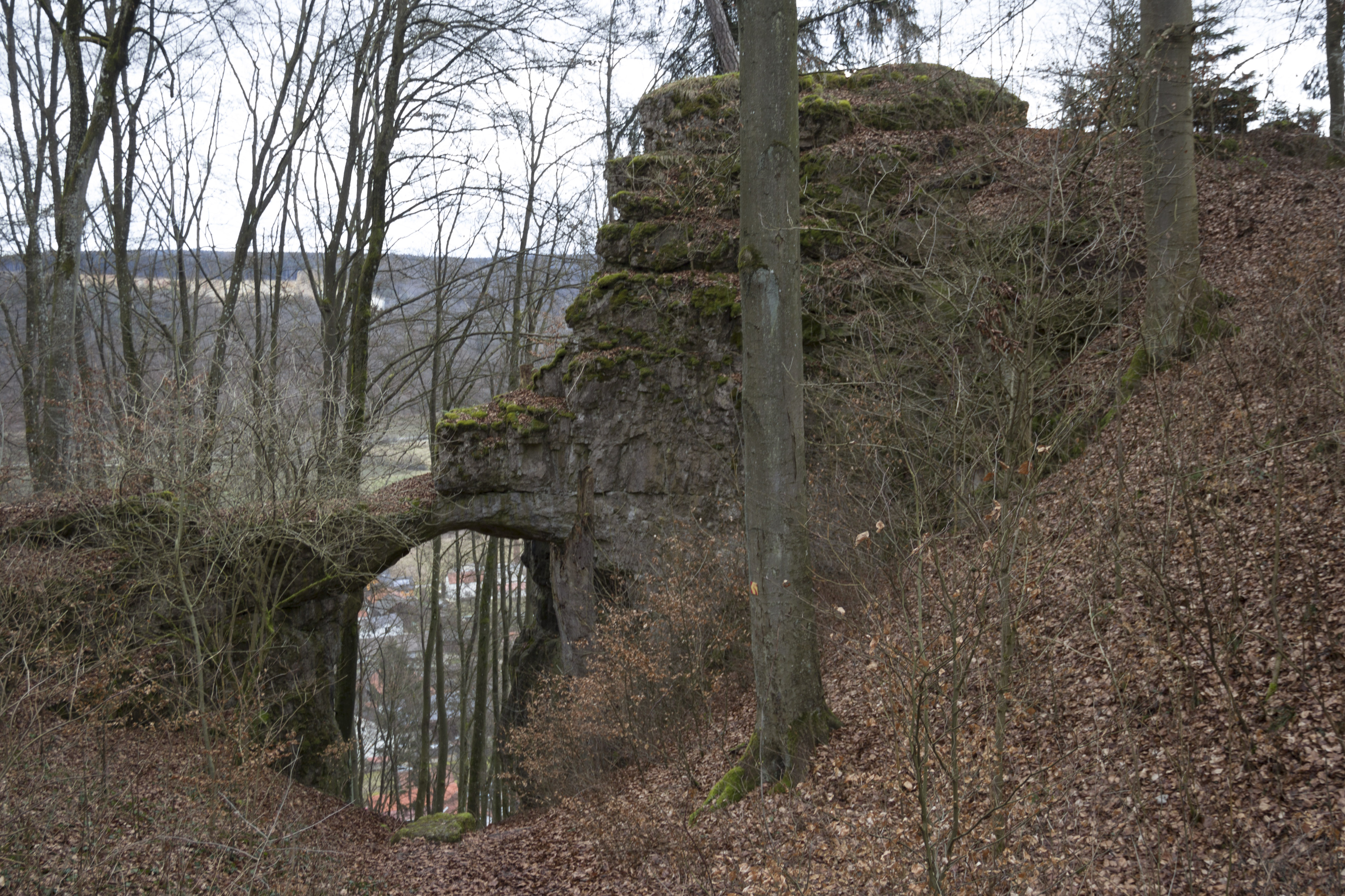 Torfelsen, Unteremmendorf, Kinding